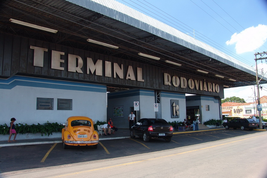 Imagem do município de Dois Córregos, estado de São Paulo, Brasil.